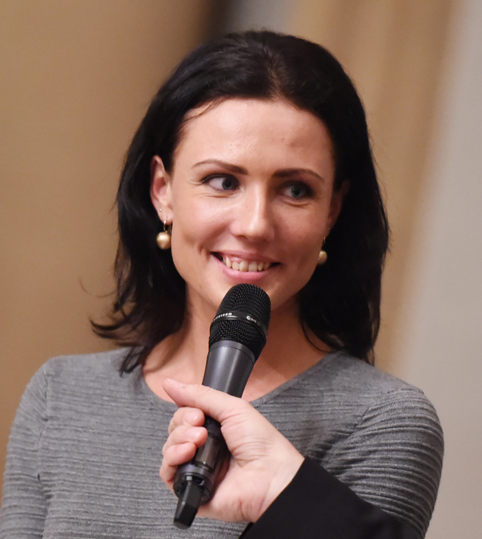 Iveta Putalová, december 2015